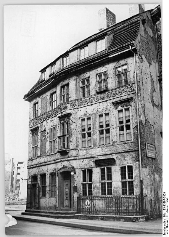 Berlin, Poststraße, Altbau, Kriegsschäden Zentralbild Gielow 18.1.1952 Alte Berliner Häuser. UBz: Haus Poststr. 23